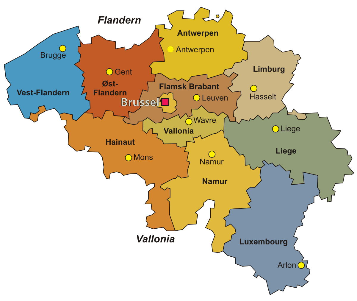 Kart over Belgias regioner og provinser